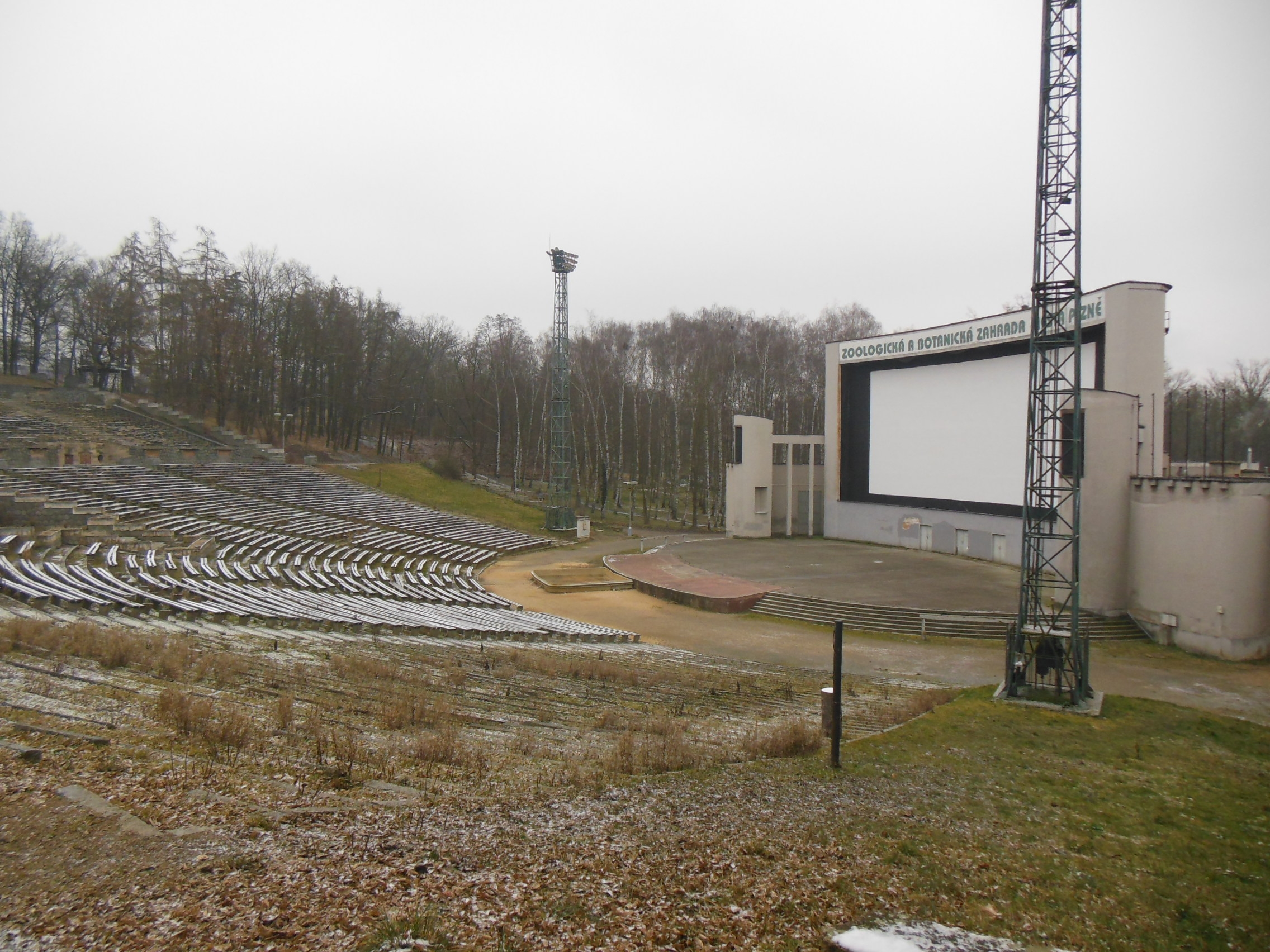 Amfiteátr v areálu ZOO Plzeň.